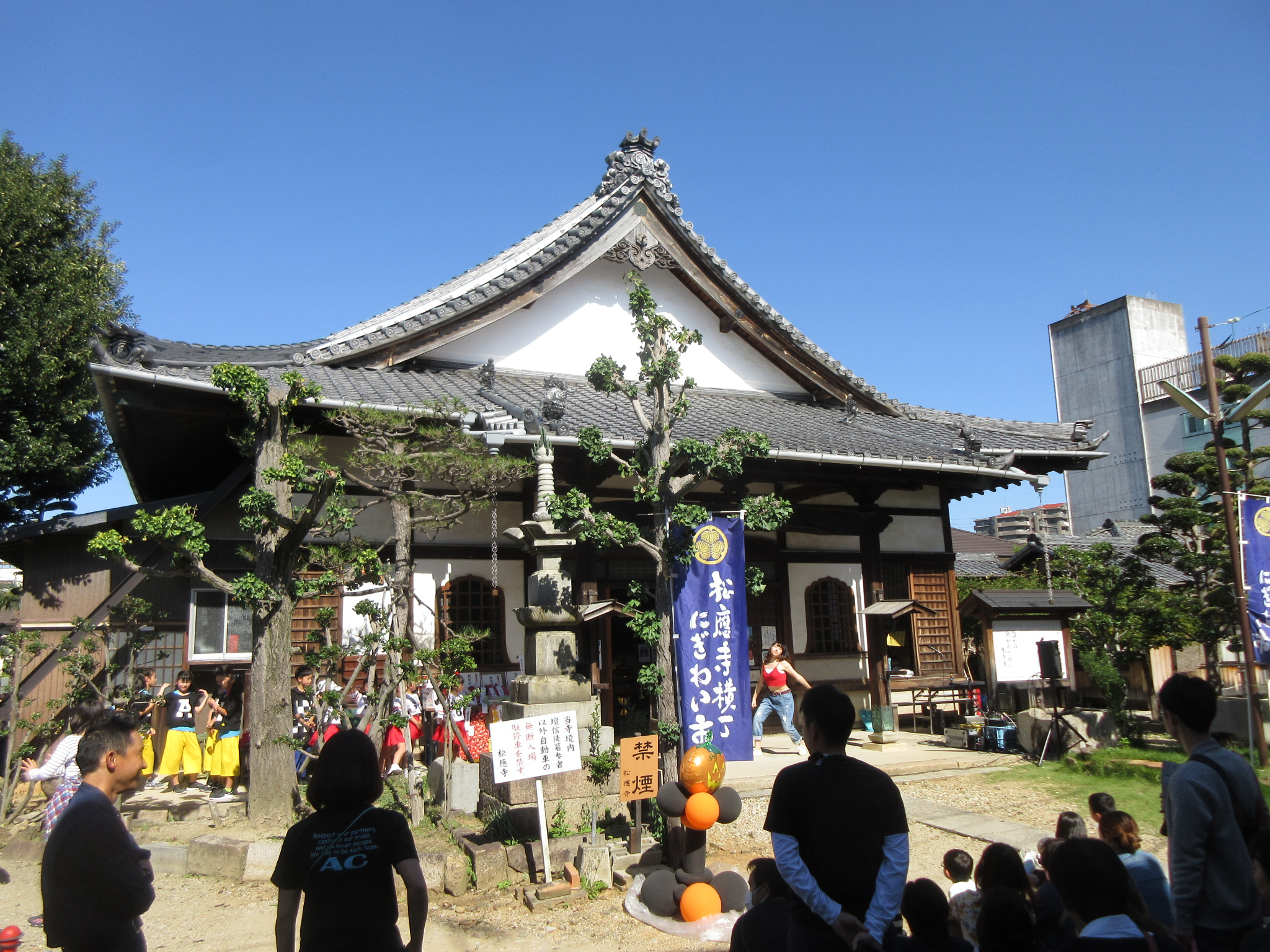 松応寺（岡崎市松本町）